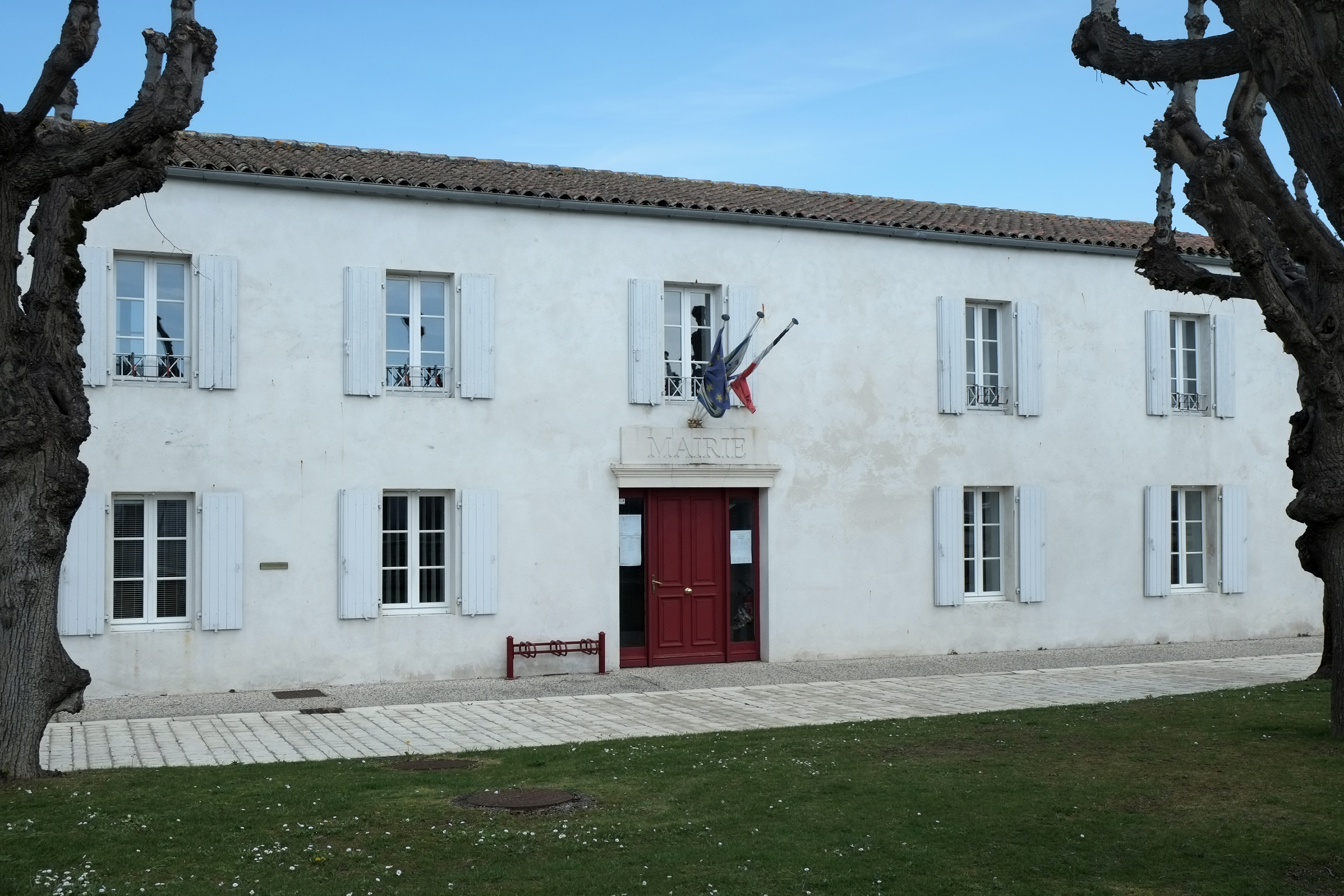 Mairie Saint-Rogatien Charente-Maritime France